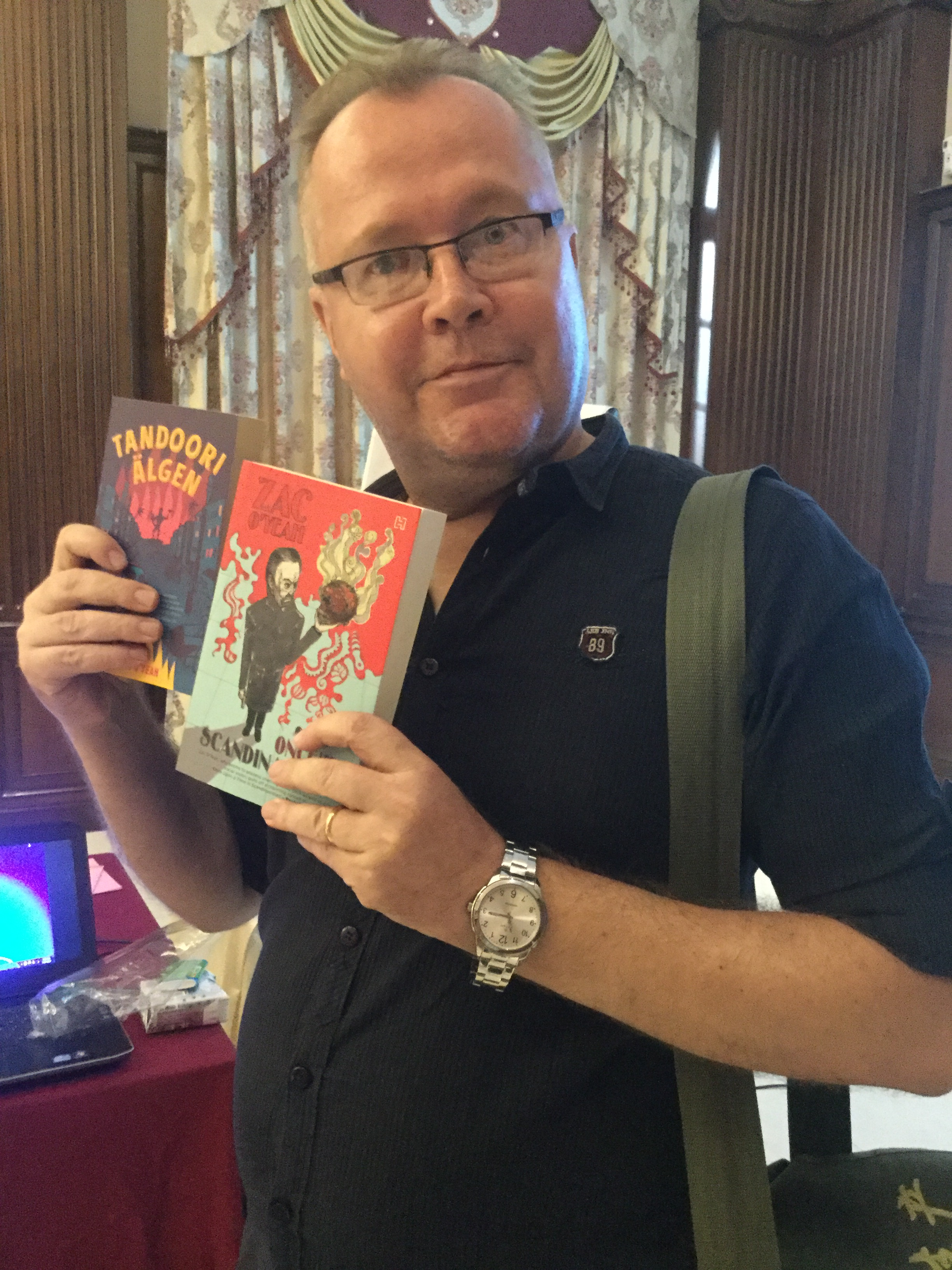 Bild av den finsk-svensk-indiske författaren Zac O'Yeah, Sakari Nuottimäk